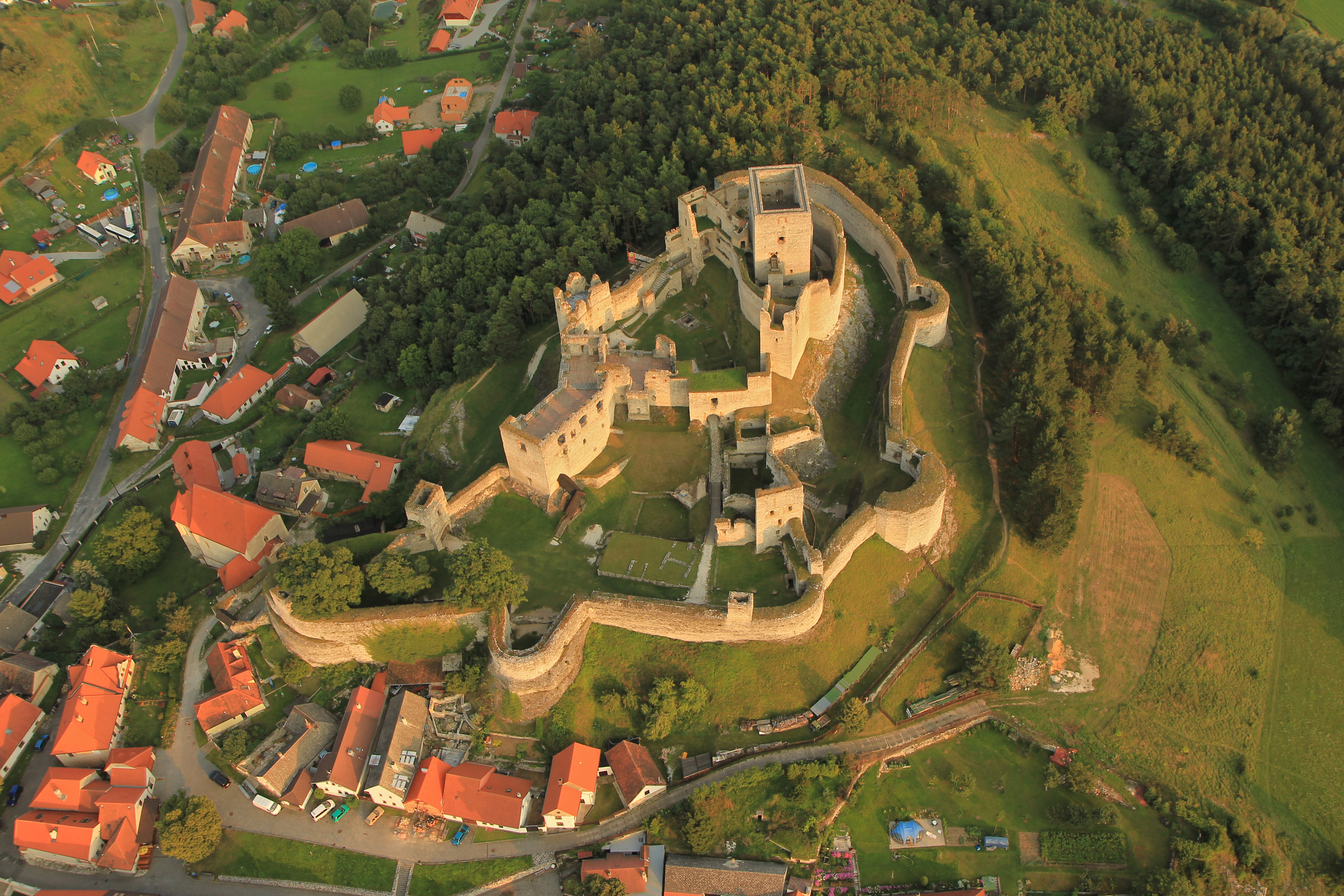 Hrad Rabí s hradním kostelem Nejsvětější Trojice, část stojící, část zřícenina a archeologické stopy (Rabí), na skalnatém výchozu kopce, Rabí